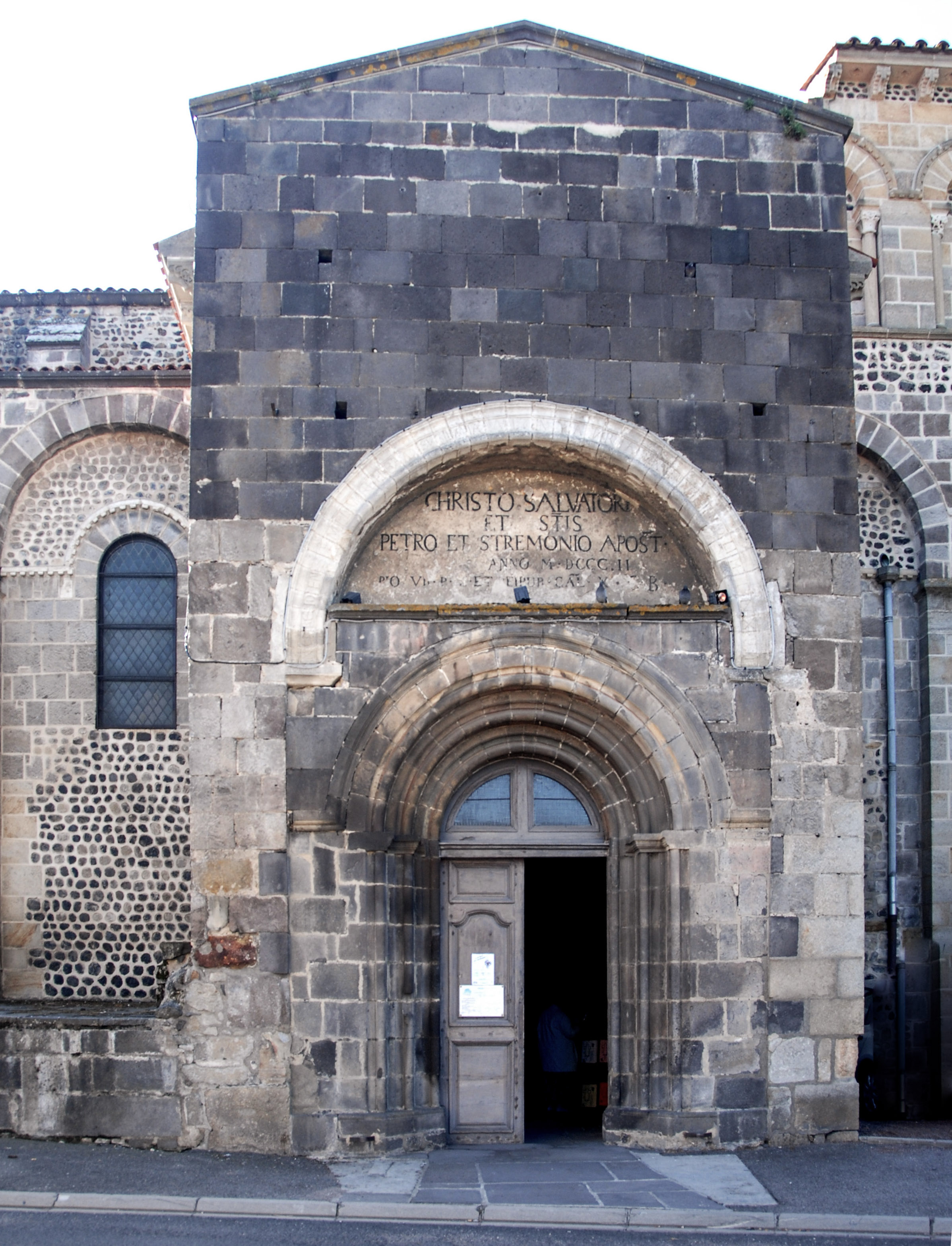 Mozat, Vorhallengiebel Hauptportal